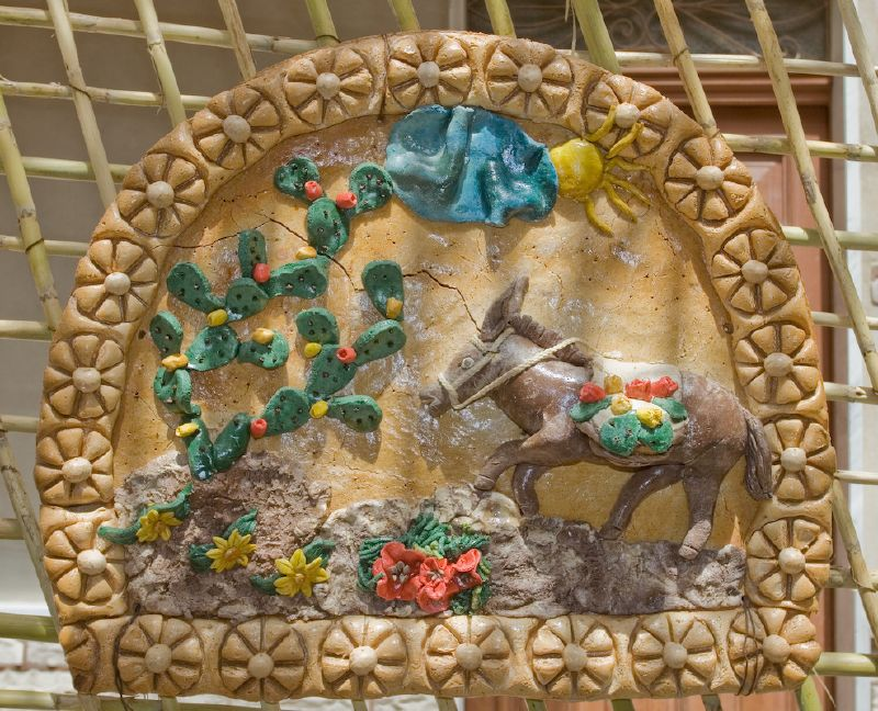 Quadretti in pasta di pane dei "signurara"